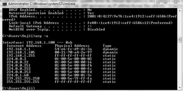 Монгол: Энэ хүснэгтэн дээрх хаягуудыг ARP протокол нь ARP Request, response ашиглан олж авдаг.